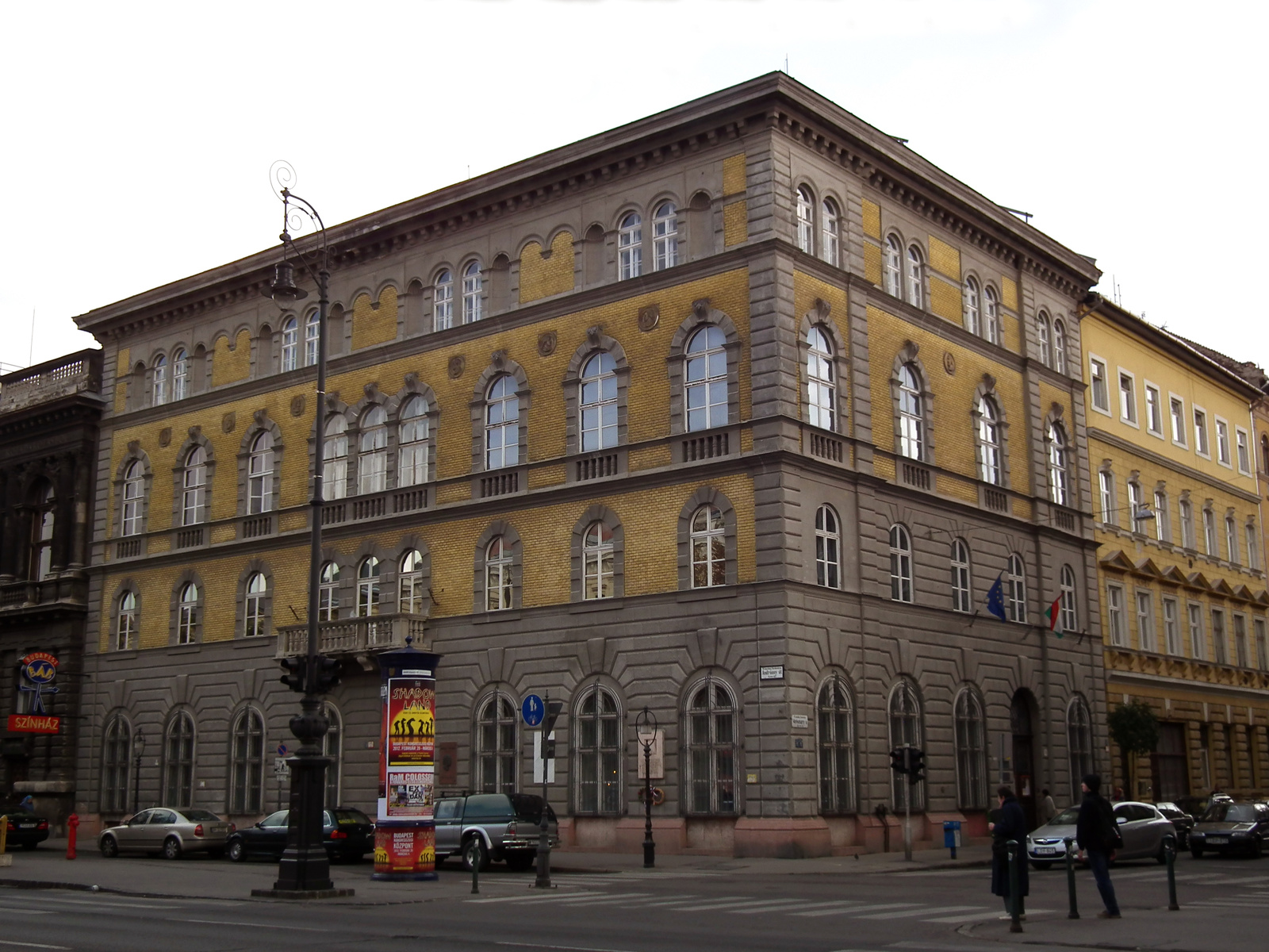 Régi Zeneakadémia (Budapest 6, Andrássy út 67., Vörösmarty Mihály utca 35.) This is a photo of a monument in Hungary. Identifier: 711